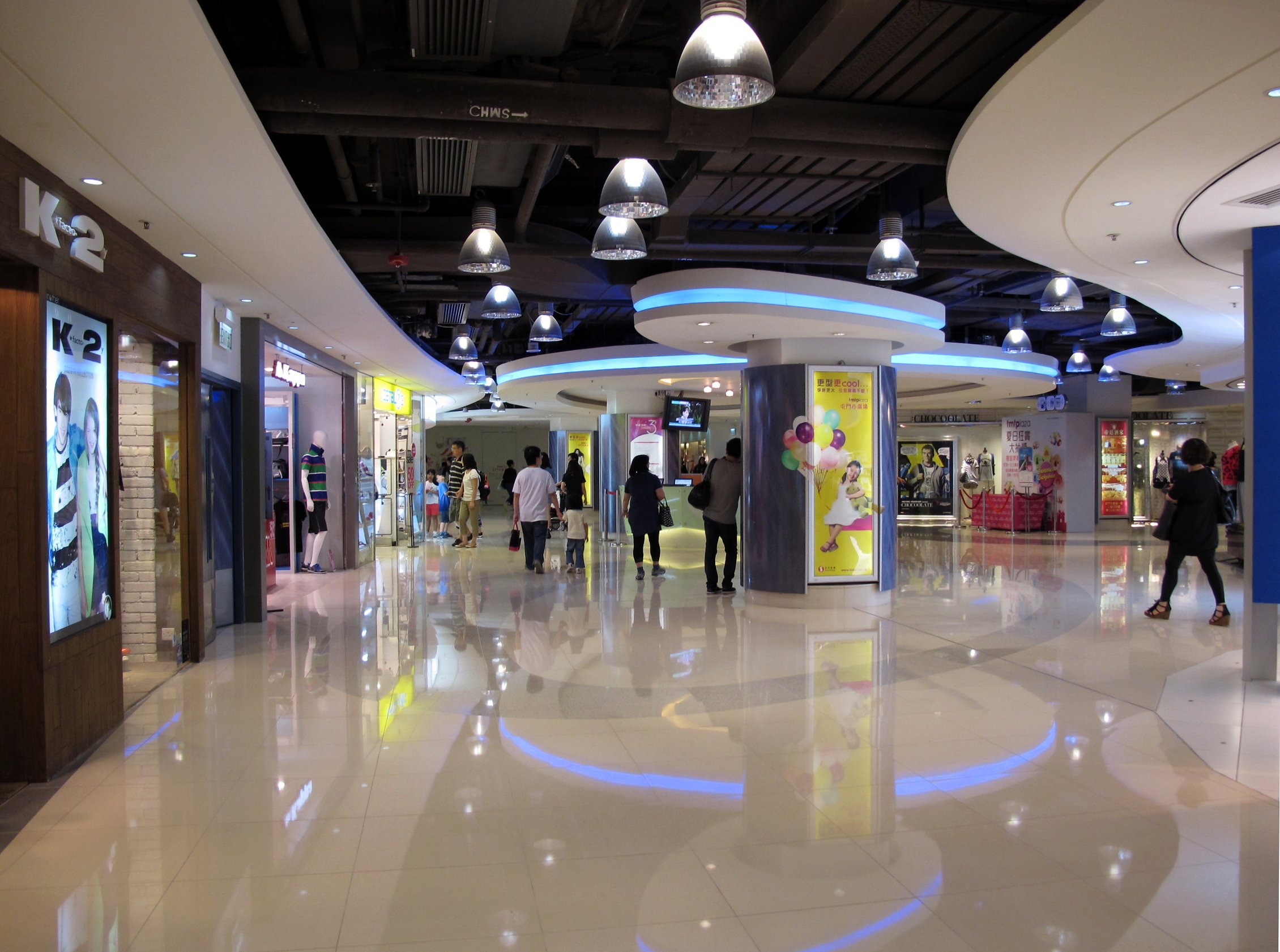 Tuen Mun Town Plaza Level 3 屯門市廣場3樓